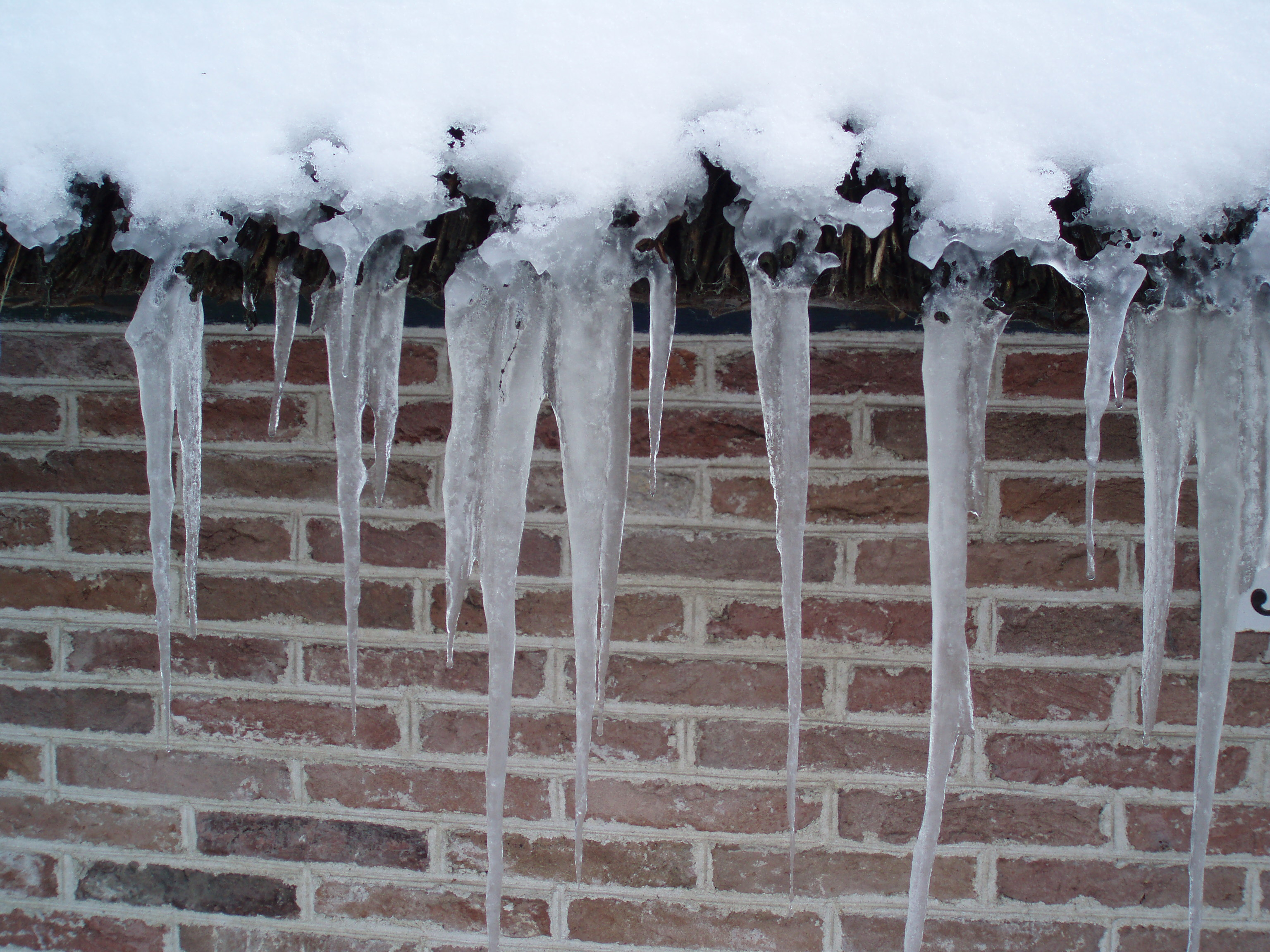 IJspegels aan een boerderijdak in het Westerse Bos in Schoonebeek